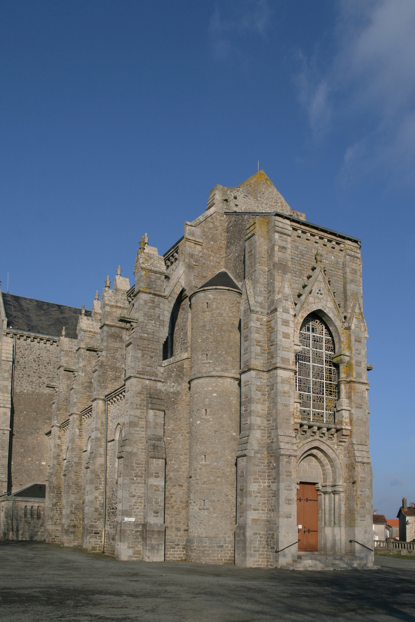 Basilique de Pitié